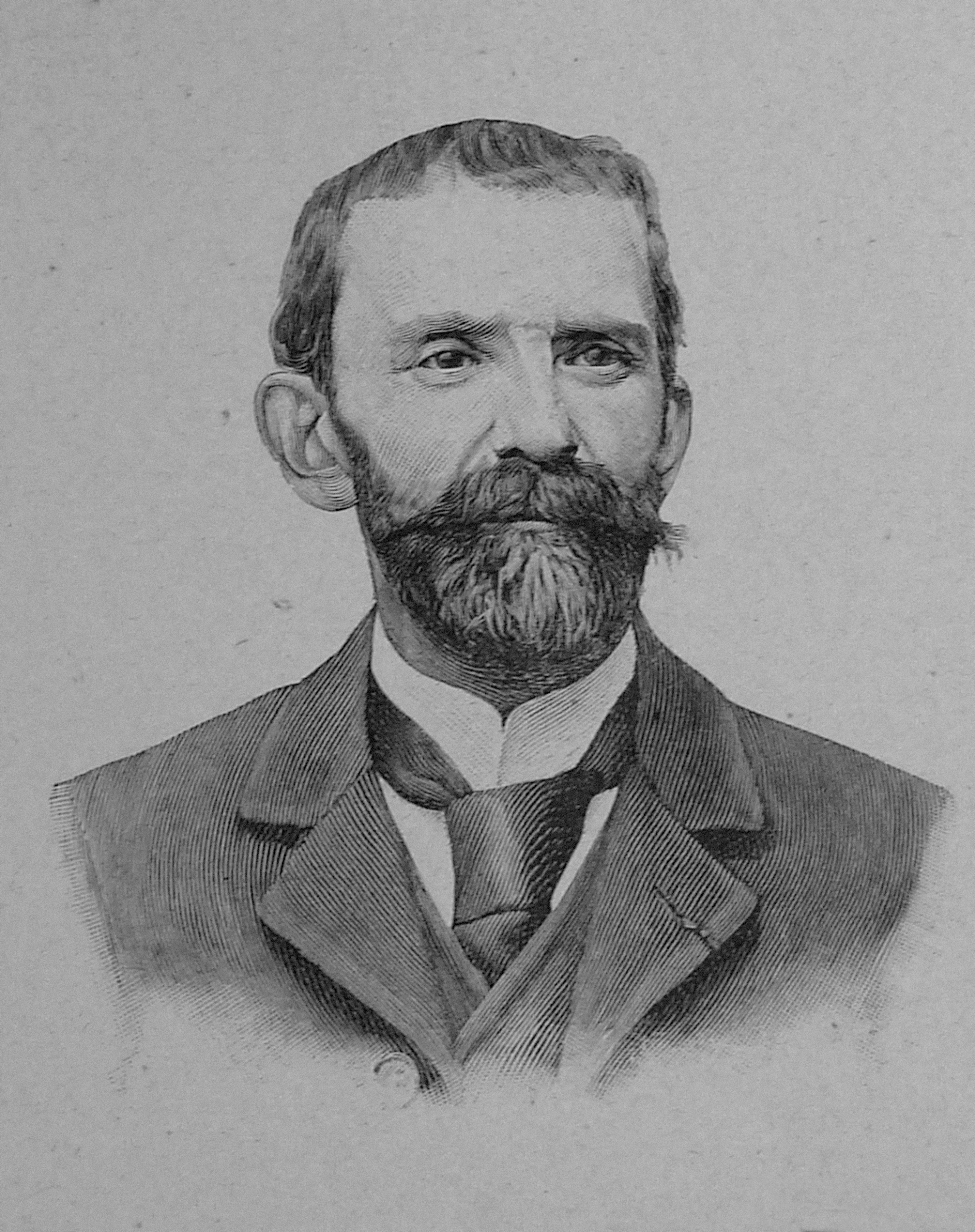 Victor-Gabriel Gilbert, gravure d'après photo dans Figures contemporaines Album Mariani tome VII, 1902. Gravure non signée.